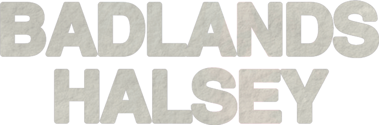 Badlands Logo